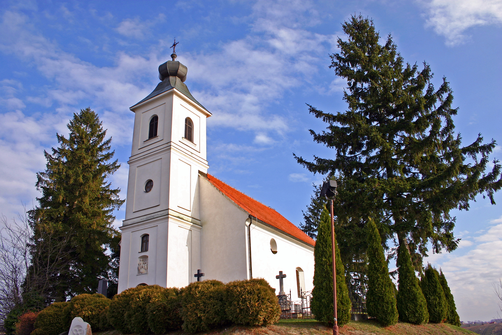 Župnijska cerkev sv. Trojice v Lendavskih goricah stoji na manjši vzpetini vzhodno od mesta Lendava. je bila v baročnem slogu zgrajena leta 1728. V njej je ohranjena mumuja Mihaela Hadika. Viri: Register nepremične kulturne dediščine © Ministrstvo za kulturo